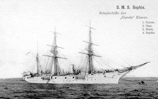 Das Schulschiff Sophie der Kaiserlichen Marine